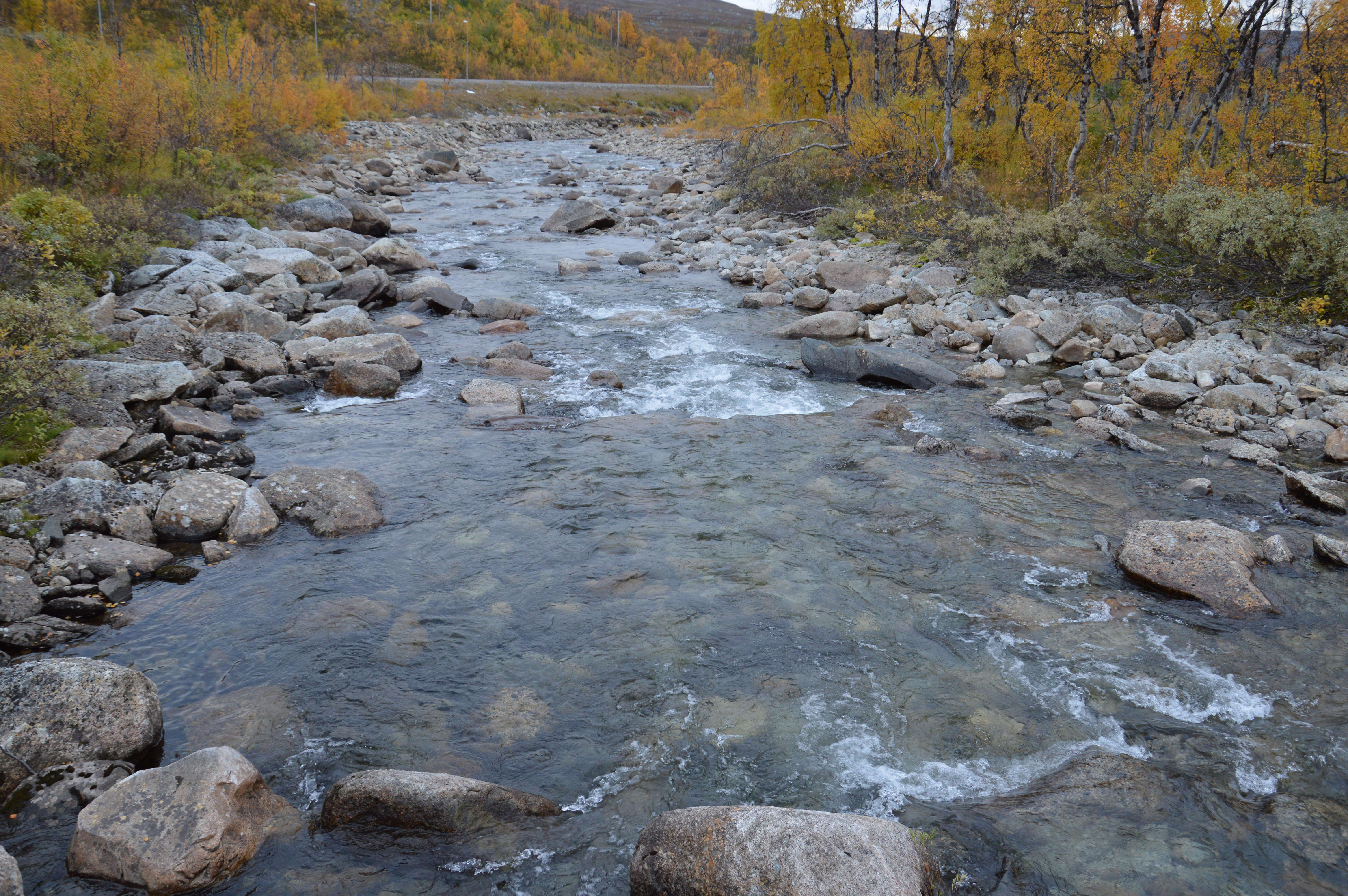 Gubbeltåga i nærheten av bomstasjonen like nord for brua i Stokkalia, den 25. september 2012